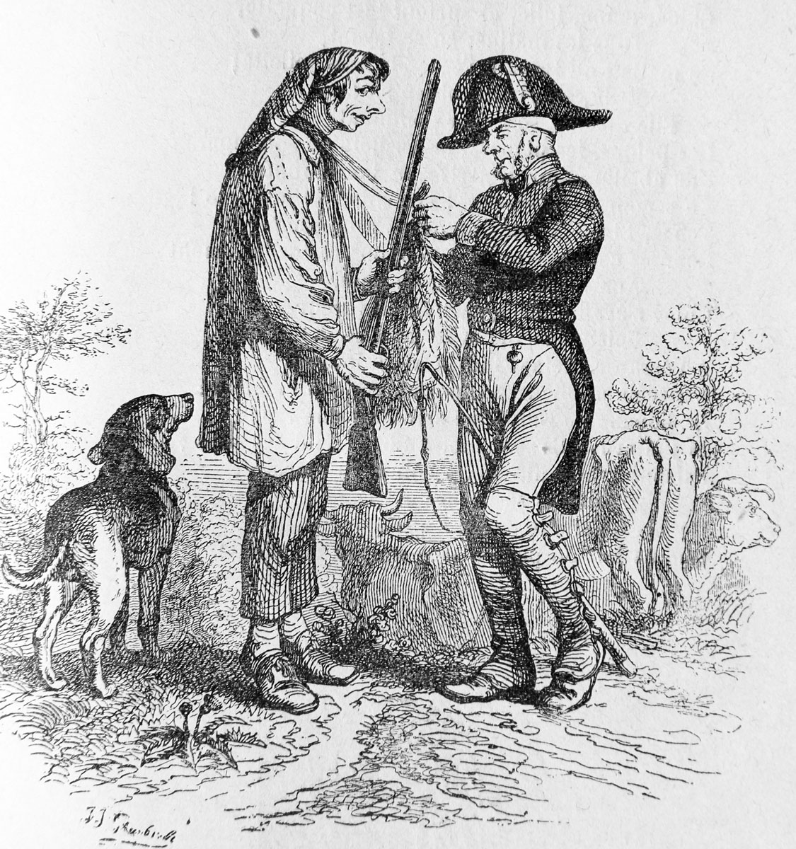 Illustration de Grandville pour les fables de Florian. Source: Oeuvres de Florian, Paris, Paul Brodard, 1913.